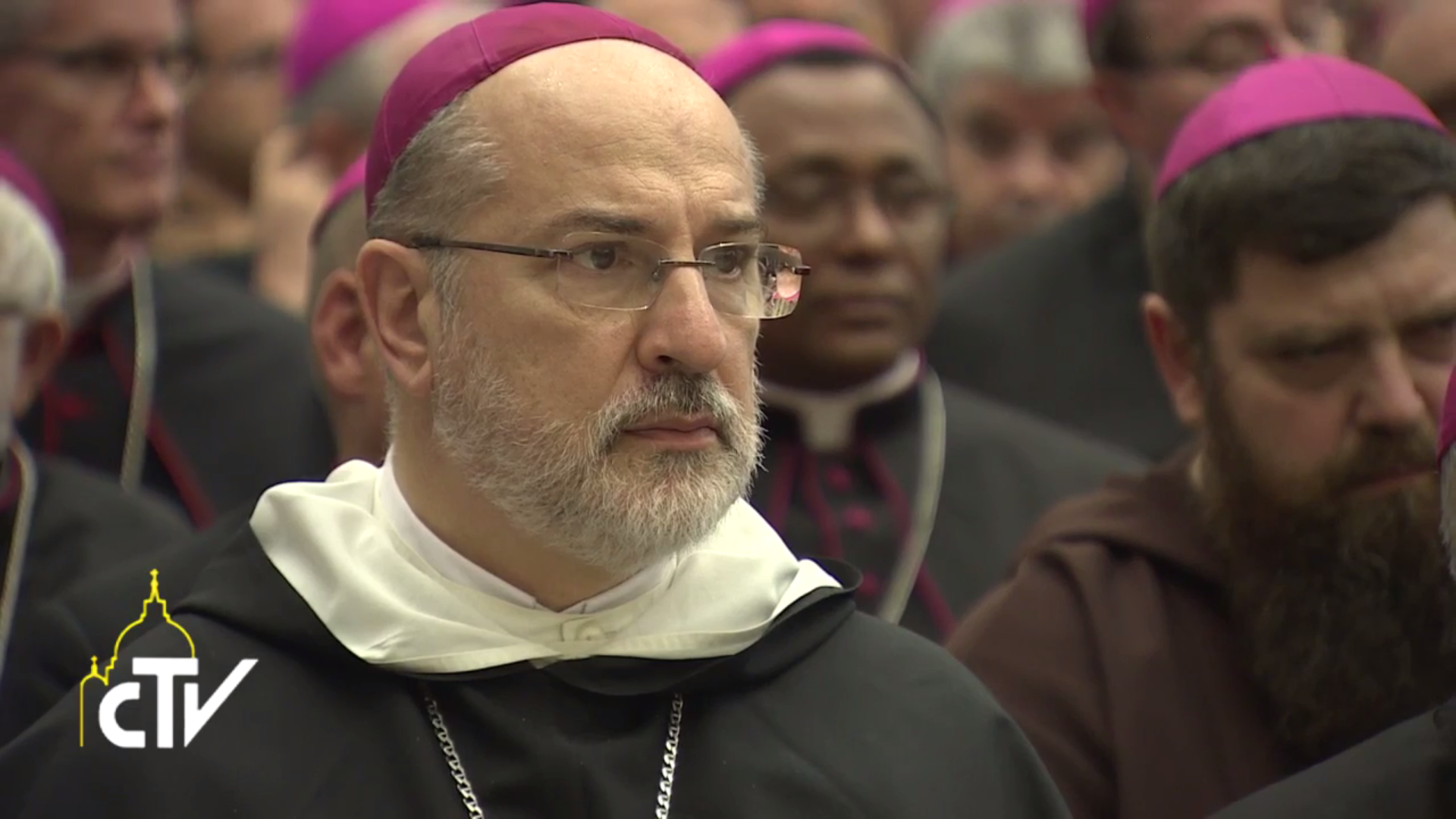 Mgr Carlos Alfonso Azpiroz Costa à l'audience accordée par le pape François à l'occasion de la session de formation des nouveaux évêques de l'année.